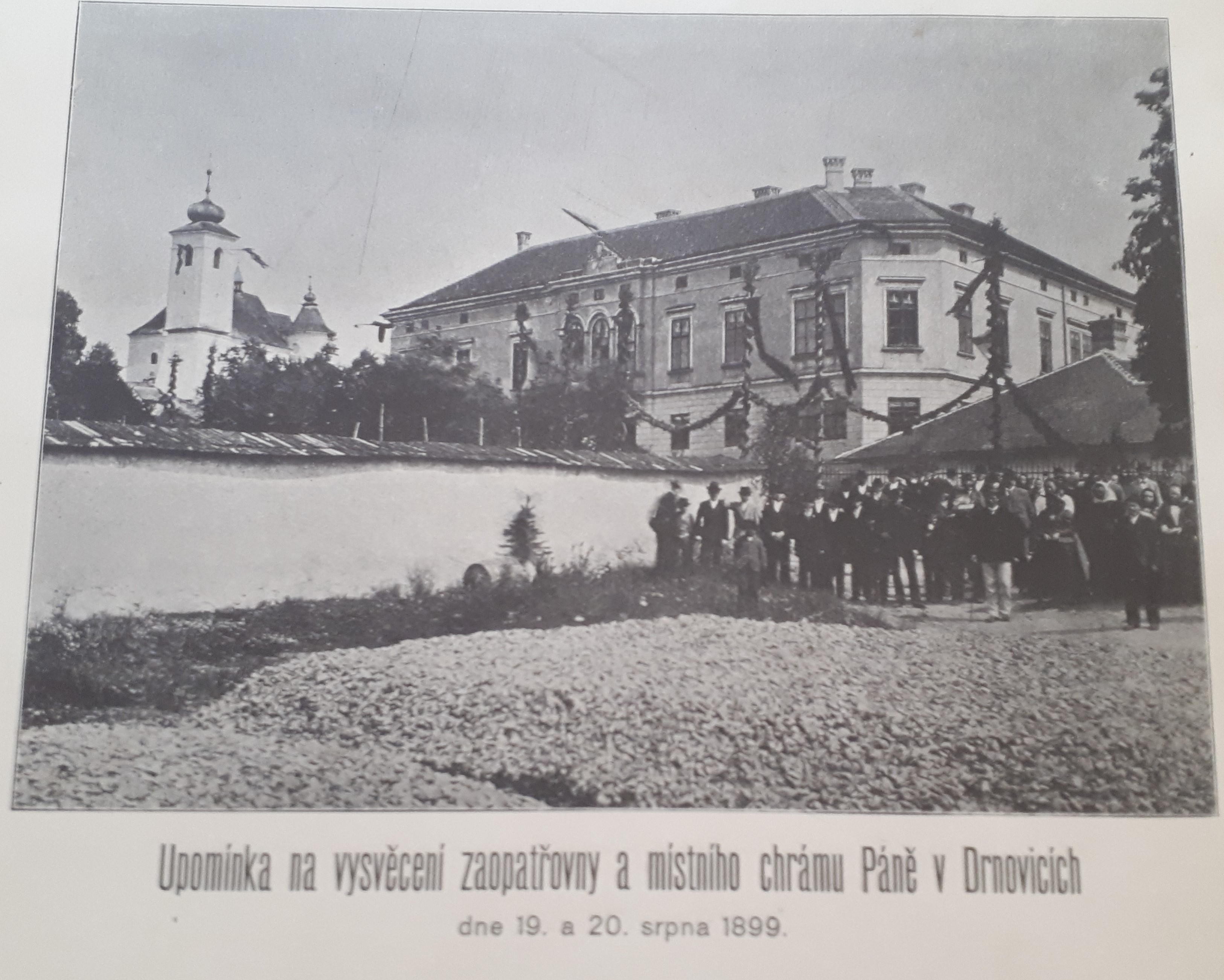 Upomínka na vysvěcení zaopatřovny a místního chrámu Páně v Drnovicích SOkA Vyškov, fond NŠ, Drnovice, sign. IV/1 Kronika národní školy obecné v Drnovicích 1878-1902. Foto Petr Steiner (25.7. 2018).